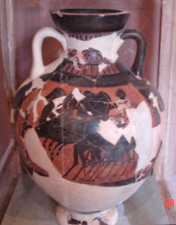 Panathenaische Amphore aus Sparta